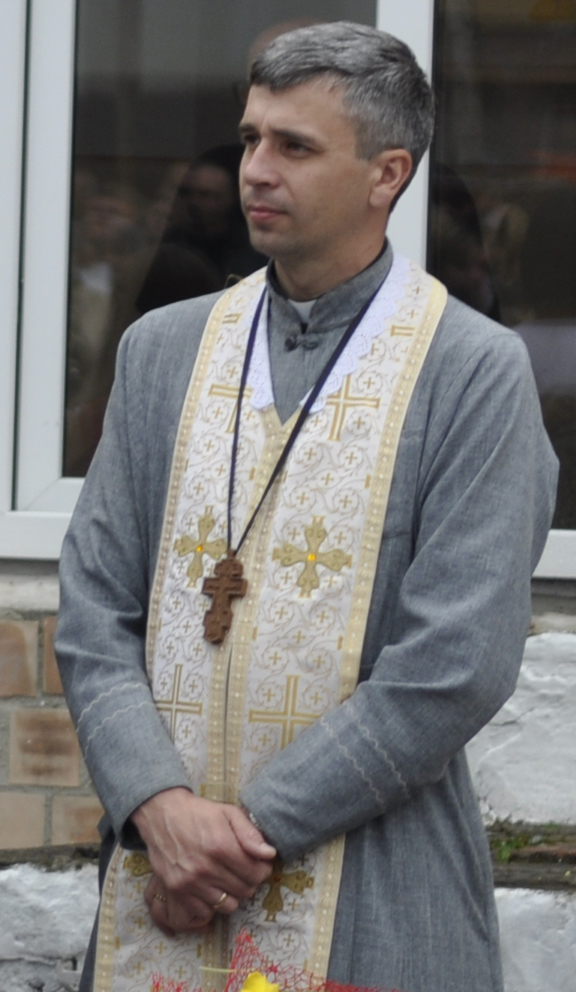 Роман Гарасимів